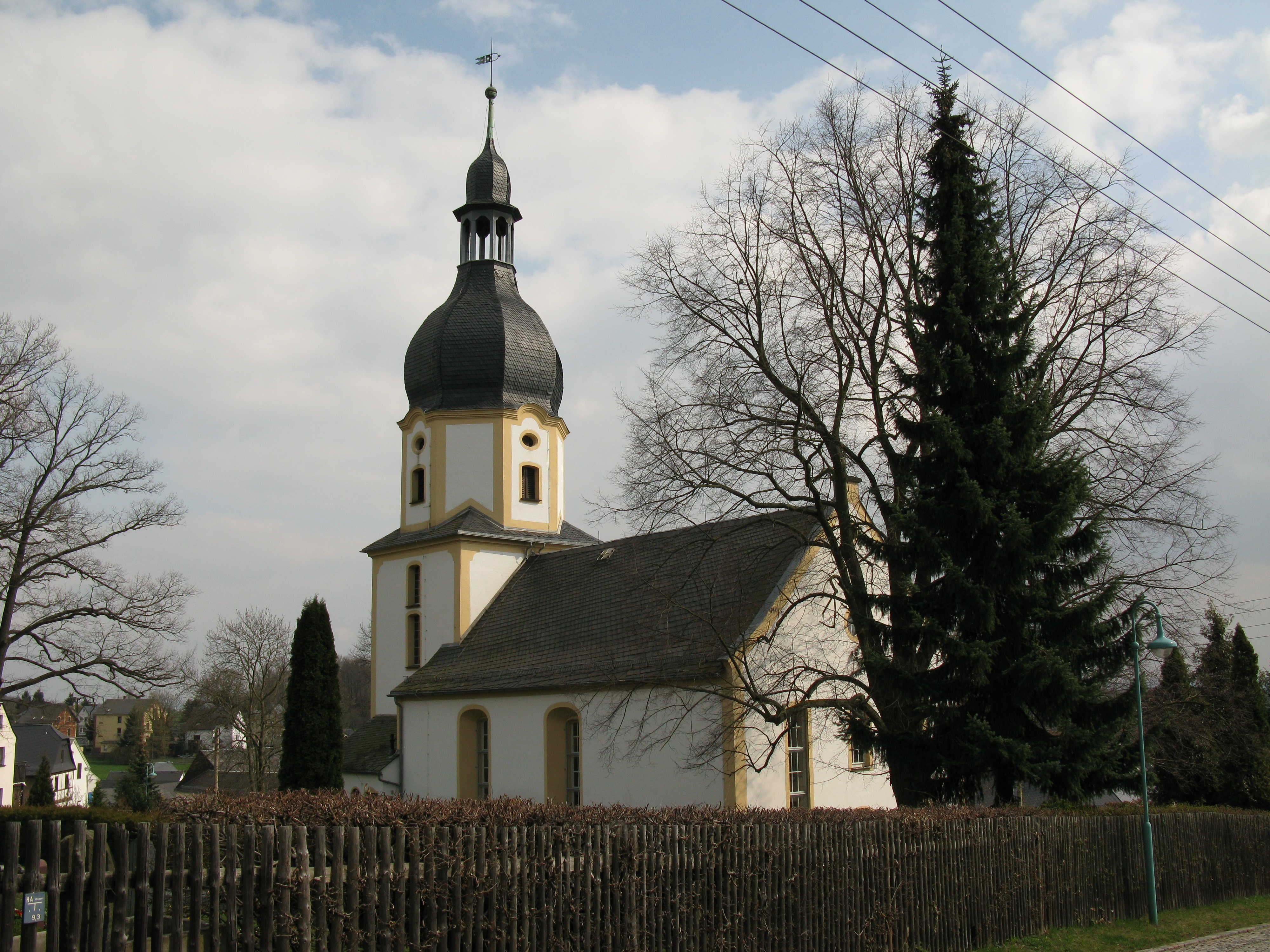 Die Dorfkirche im Plauener Stadtteil Jößnitz